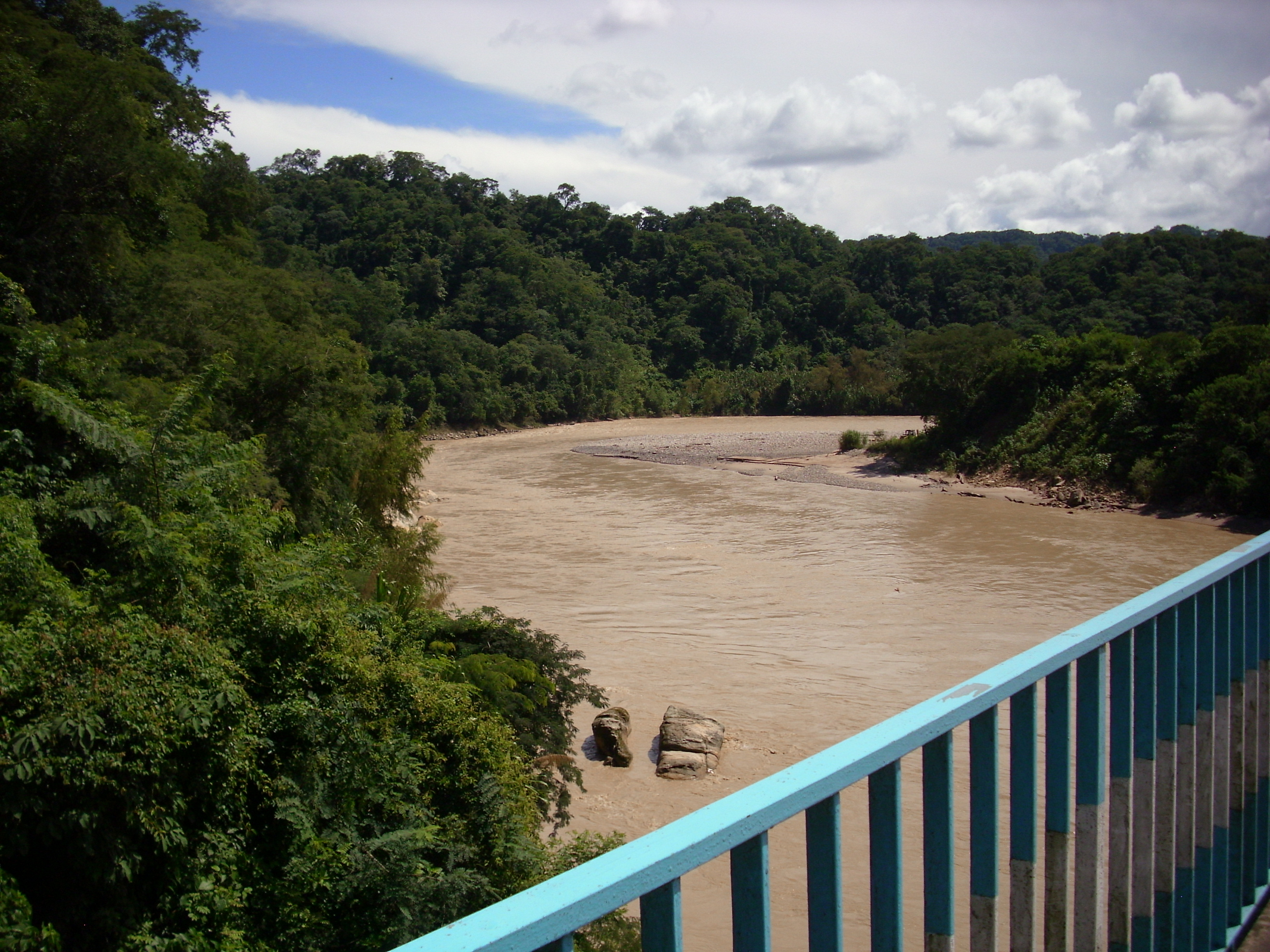 Puente Internacional - Vista Rio Bermejo